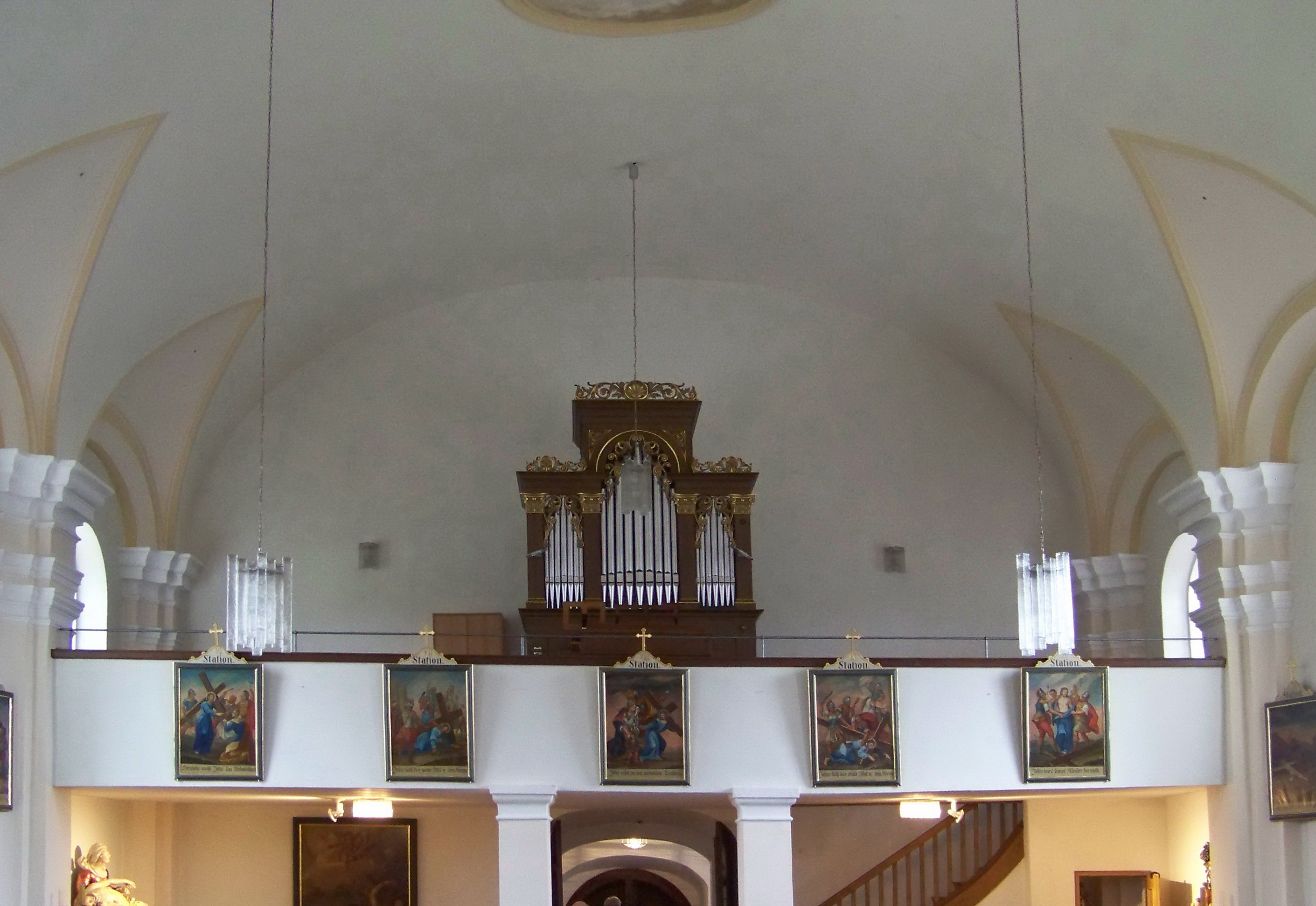 Neufahrn in Niederbayern. Hebramsdorf 5. Filialkirche St. Johannes der Täufer. Erbaut 1730, über älterem Kern; mit Ausstattung. Langhaus mit Tonnengewölbe und Stichkappen. Orgelempore mit gerader Brüstung.